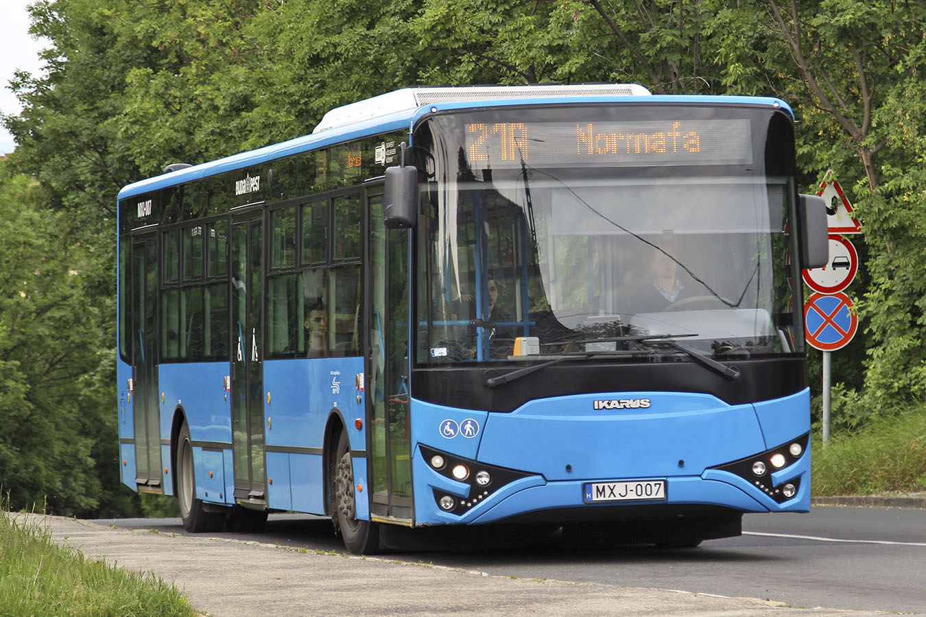 Ikarus V127 típusú autóbusz a 21-es vonalon